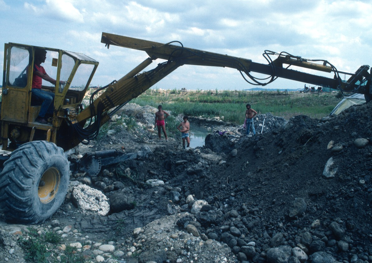 Photo prise lors d'une séance de chantier sur le site et des premiers travaux de déblaiements de surface après la création du polder